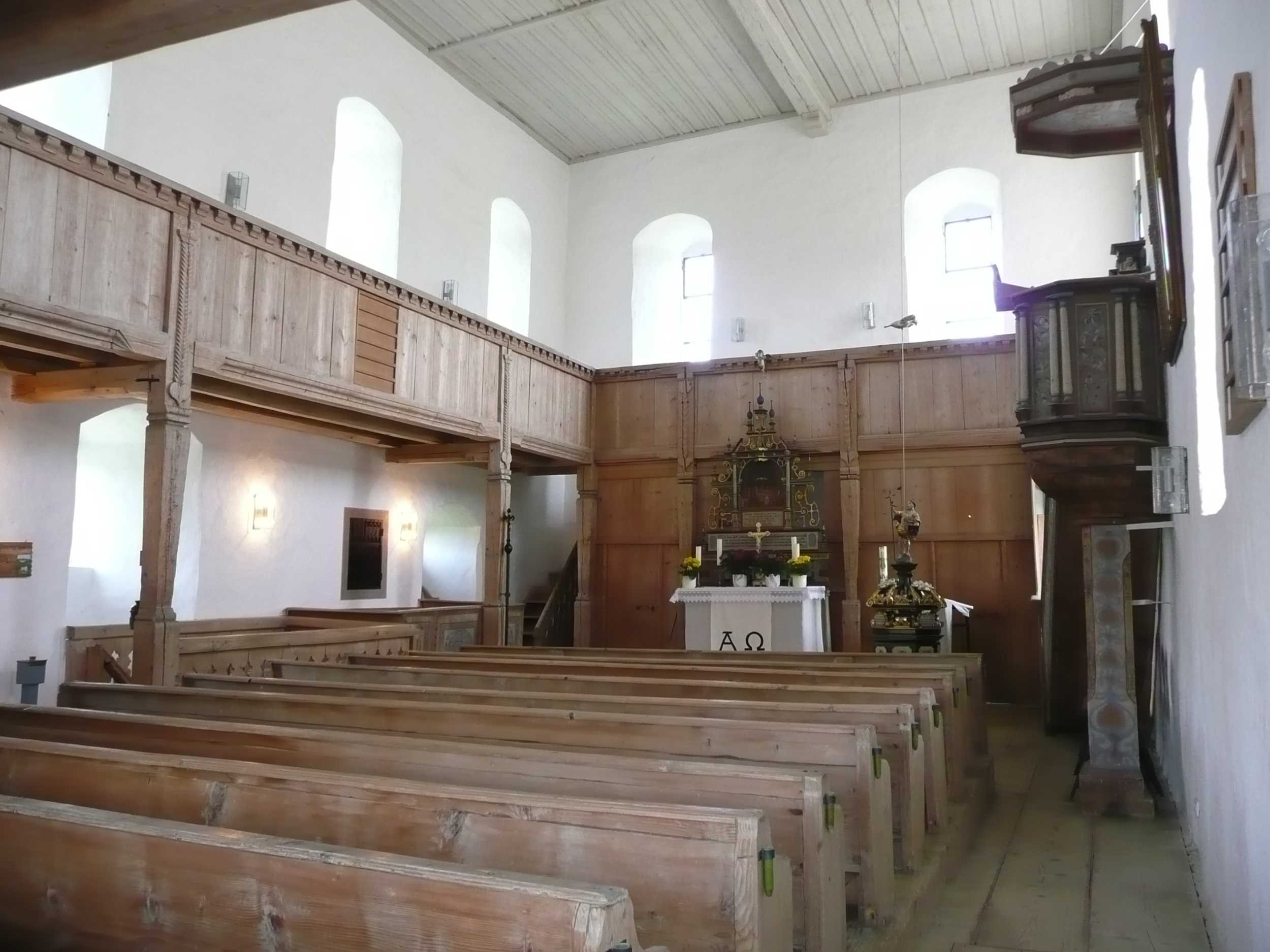 Innenraum der Burgkapelle Stein